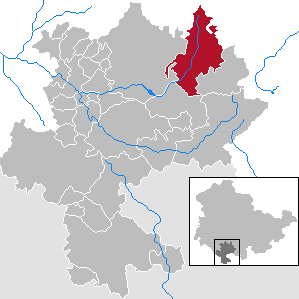 Schleusegrund in Thuringia - district Hildburghausen